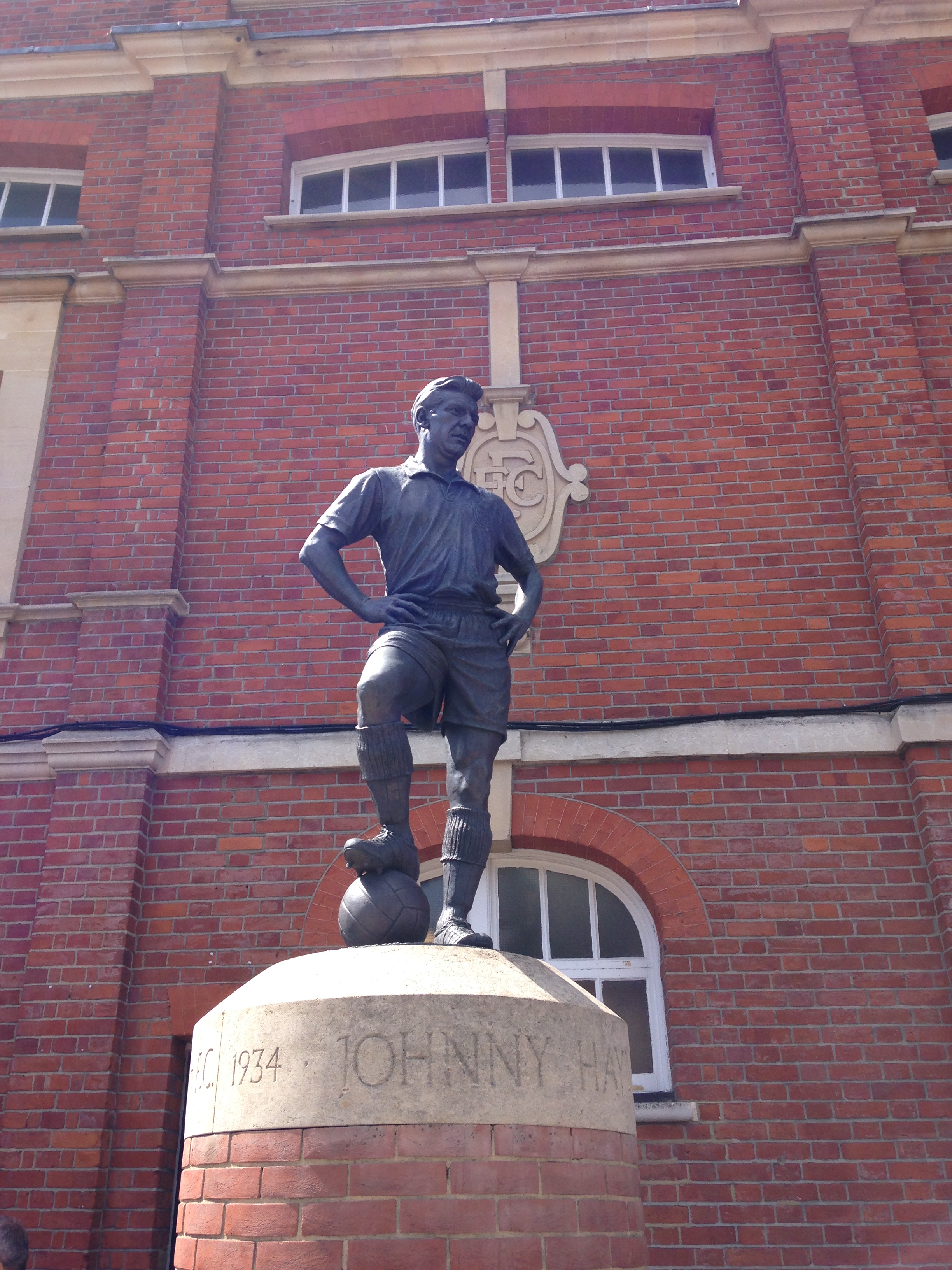 Statue de Johnny Hayes à Craven Cottage